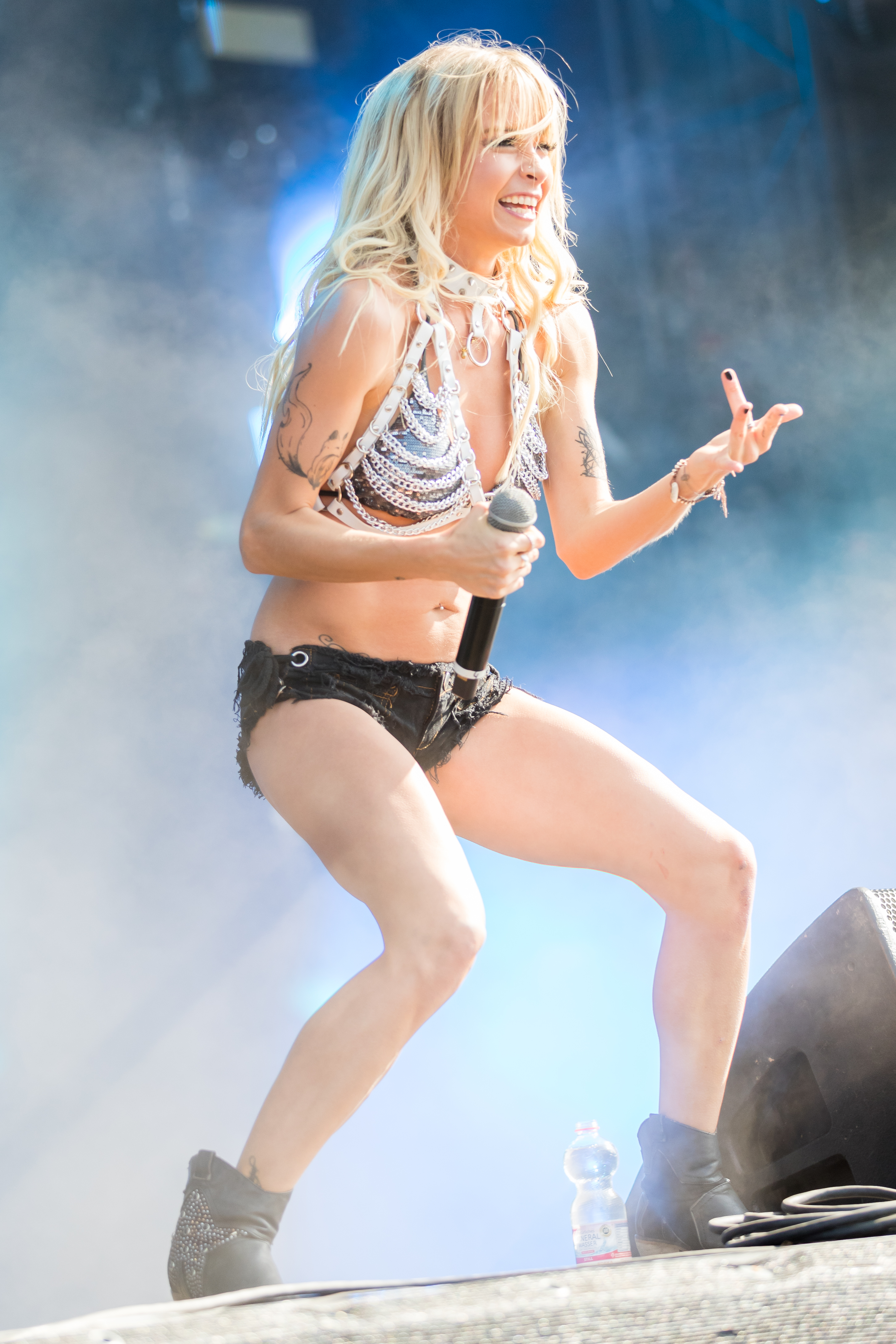 Mia Julia during Werner Rennen at Flugplatz Hartenholm, Hasenmoor, Schleswig-Holstein, Germany on 2019-08-30, Photo: Sven Mandel